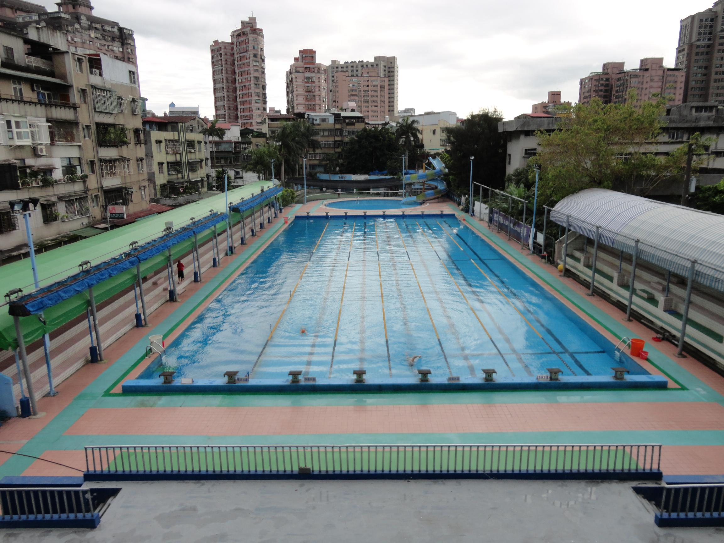 自強游泳池